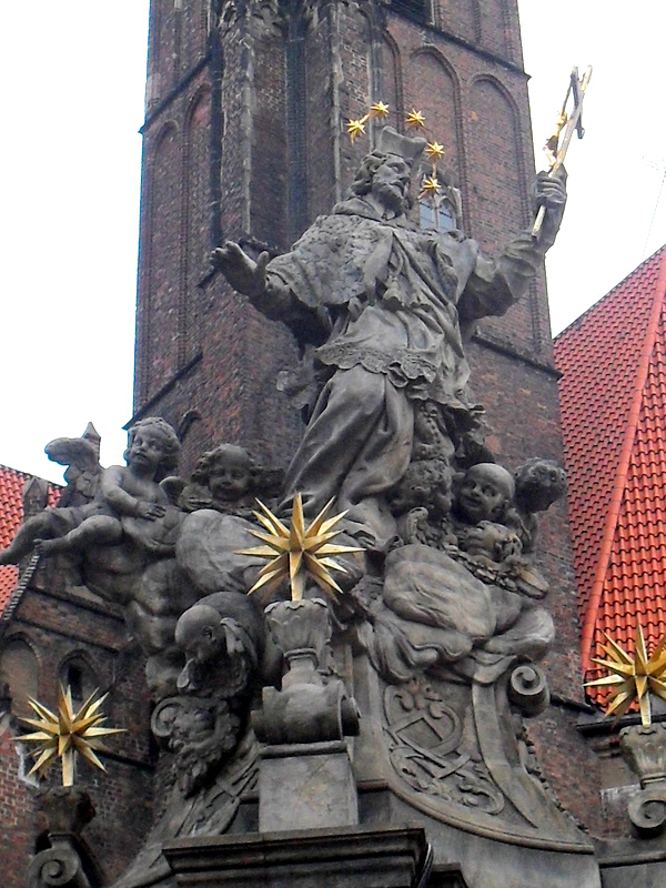 Wrocław, Ostrów Tumski, pomnik św. Jana Nepomucena przed kolegiatą pw. Krzyża Świętego